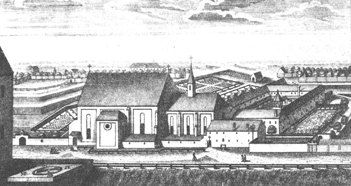 Kapuzinerkloster am Lenbachplatz (beim heutigen Bernheimerhaus)